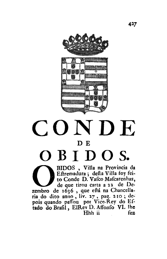 Memorias Historicas e Genealogicas dos Grandes de Portugal - Conde de Óbidos